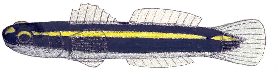 Elacatinus atronasus (Böhlke & Robins, 1968)